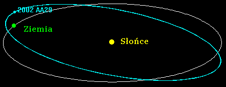 Inklinacja orbity planetoidy 2002 AA29 względem orbity Ziemi w roku 2003.